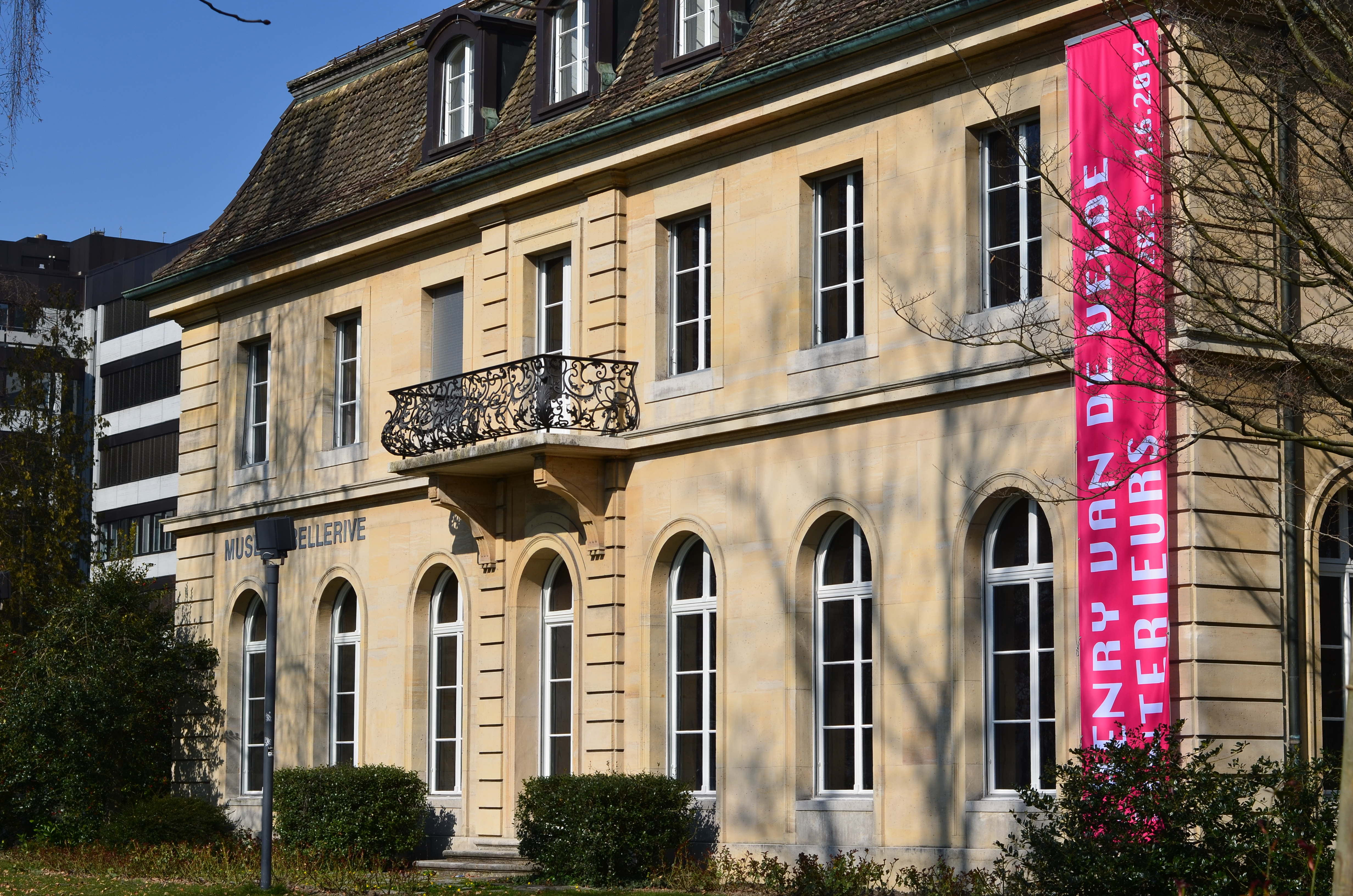 Museum Bellerive, Seefeldquai in Zürich-Seefeld